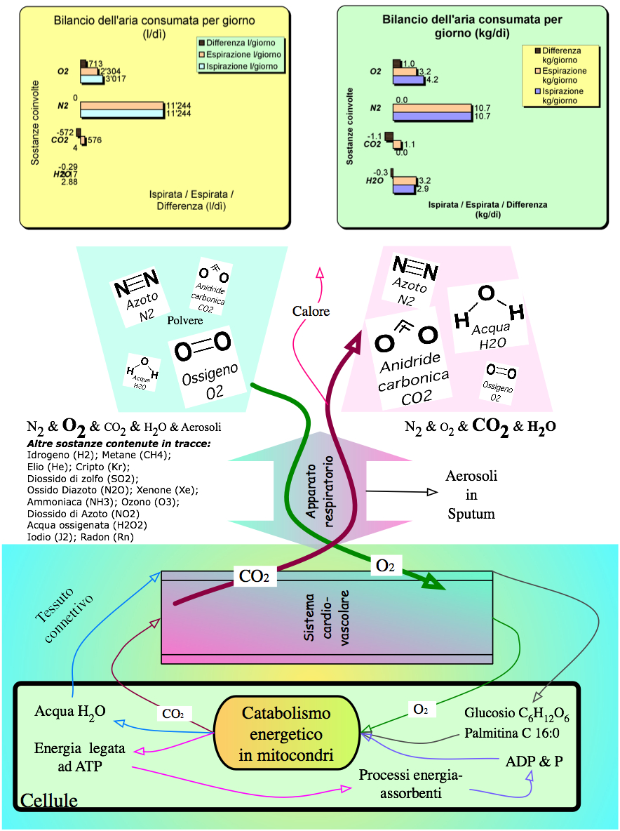 Grafica: Medicina: Respirazione: Metabolismo respiratorio: Grafica: Medicina: Apparato respiratorio: Fisiologia: Metabolismo: composizione, consumo, aria, ispirata, espirata, litri, kg, per giorno, cardiovascolare, catabolismo, energetico, mitocondri